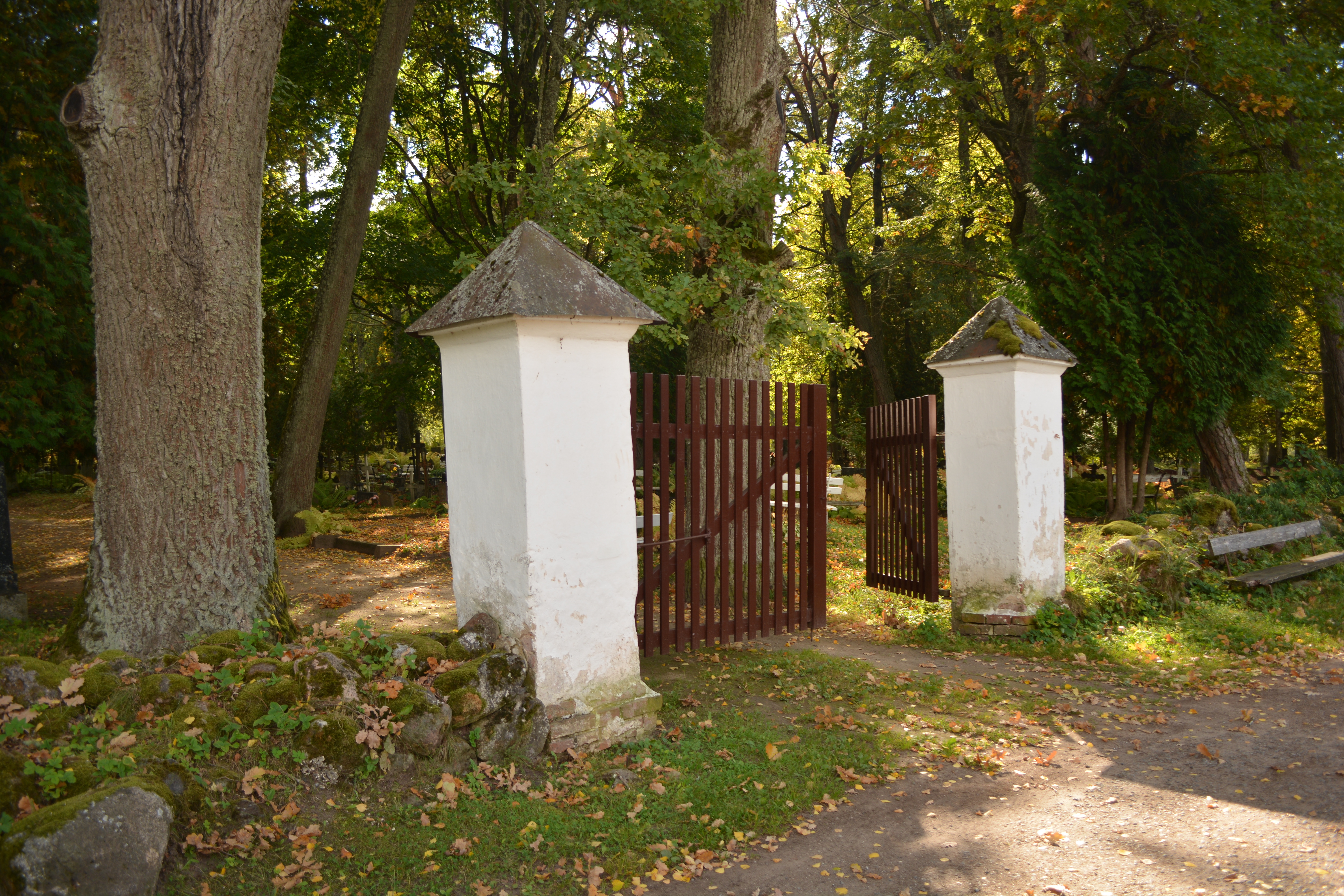 Võnnu vana kalmistu